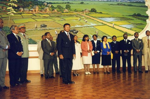 Pierrot rajaonarivelo